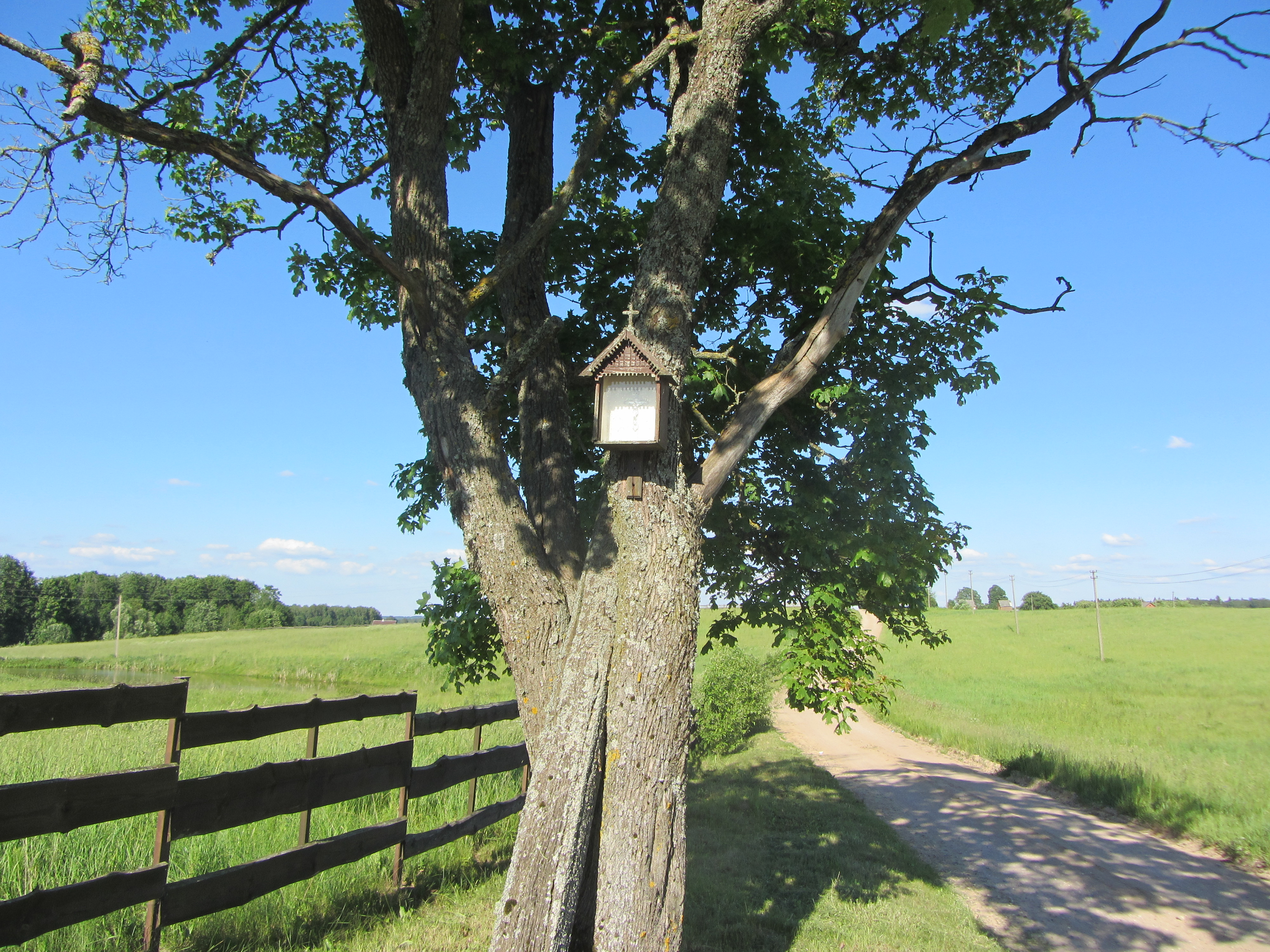 Alantos sen., Lithuania